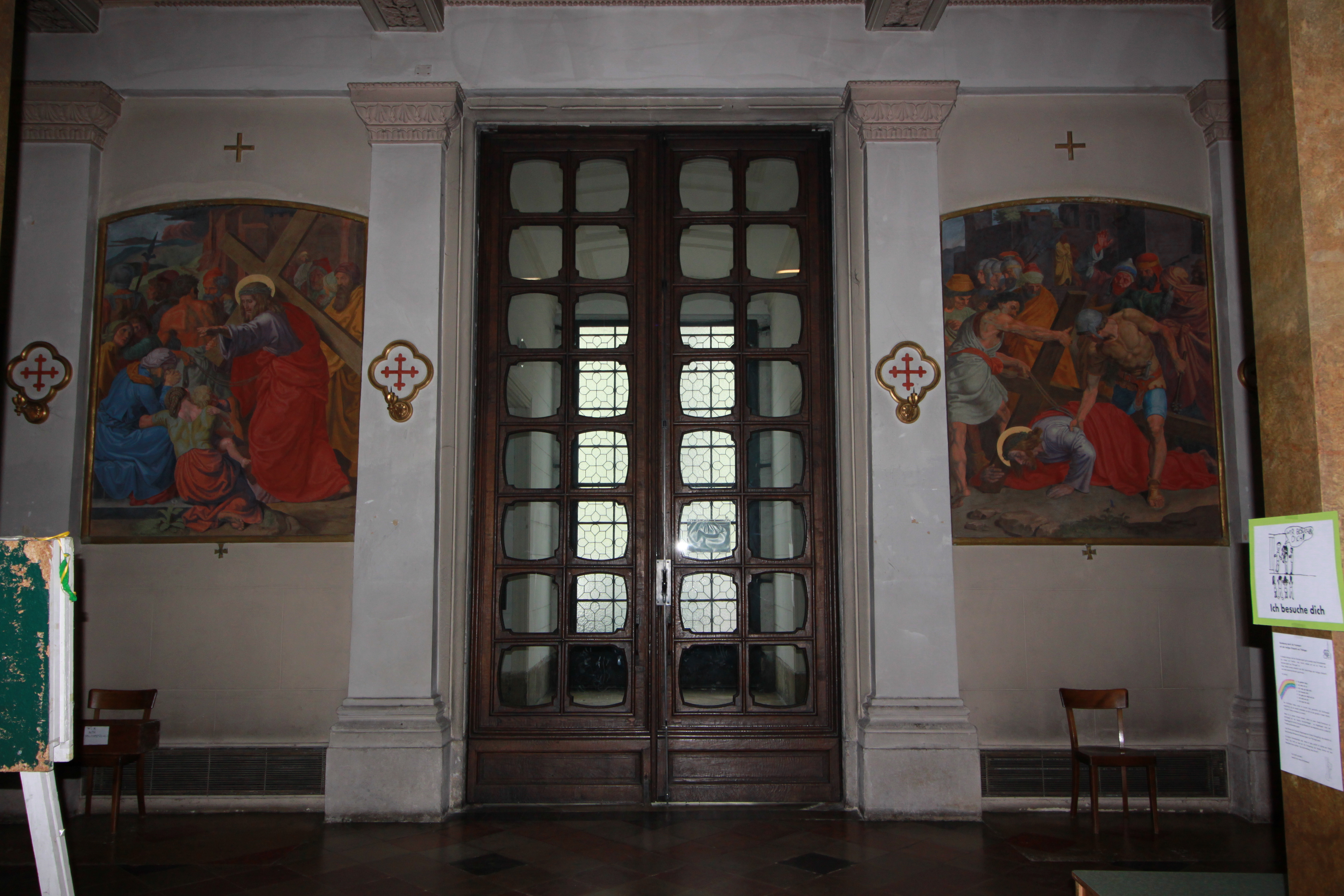 Kath. Pfarrkirche, hl Johannes Nepomuk, Kreuzweg von Joseph von Führich (1844-1846), Zwei-Bilder-Kombination, beim Haupteingang